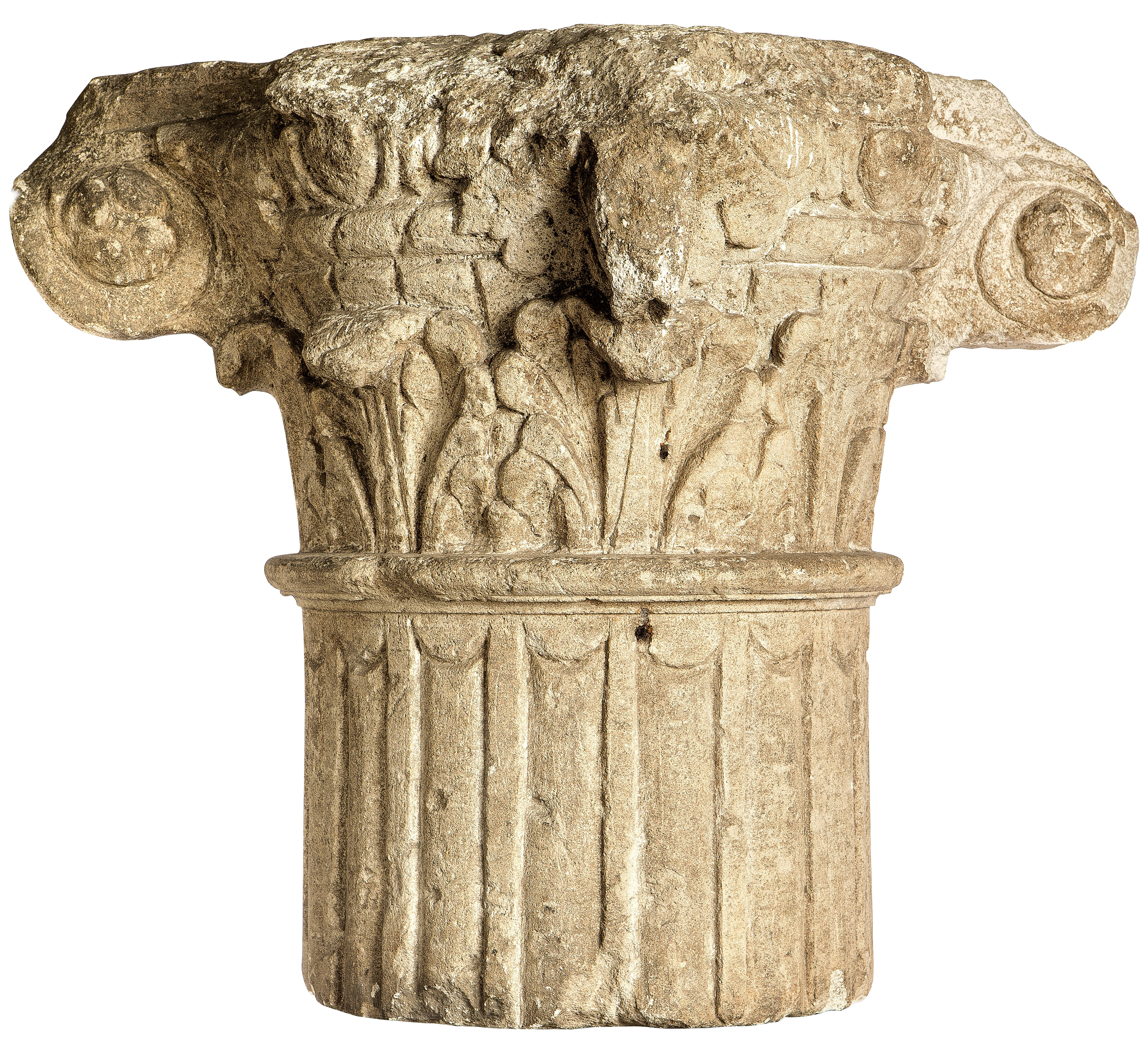 Komposietkapiteel in kalksteen, 100 tot 200 NC, vindplaats: Tongeren, Muntstraat, tegenover de Bulkerstraat, collectie Gallo-Romeins Museum Tongeren, GRM 2831